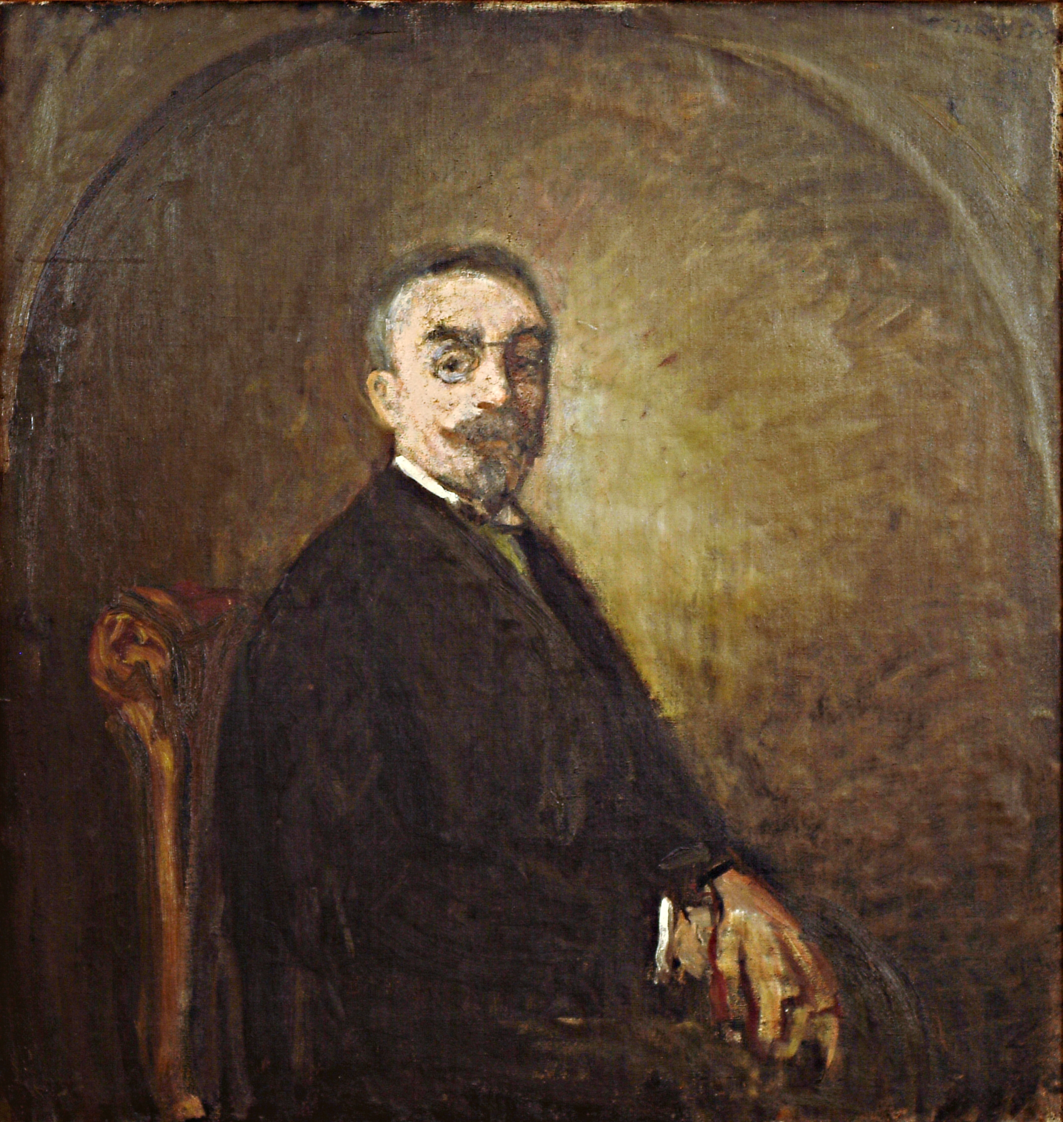 schilderij ( Jakob Smits ( Jakob Smits Museum (